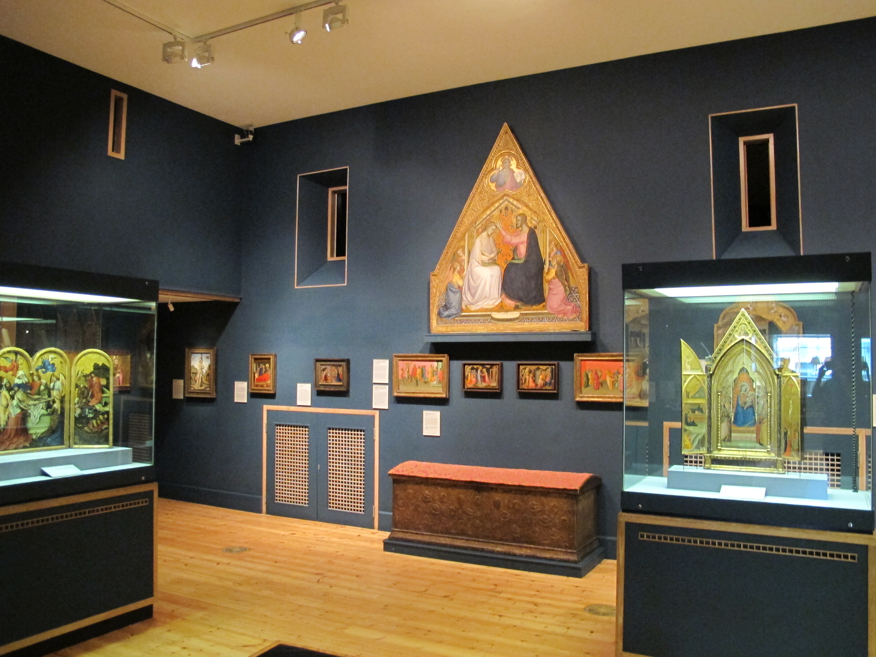 Courtauld galleries, prima sala